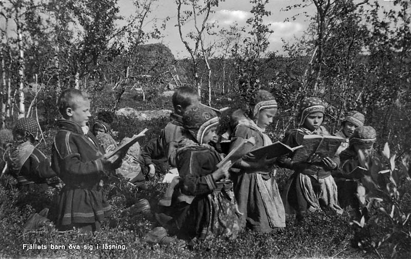 "Fjällets barn öva sig i läsning".; Byggnadsverk; Nomadnäring; Sameviste; Skola; Utbildning och vetenskap